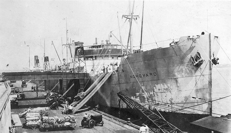 Der norwegische Frachter Nordvard in New Orleans